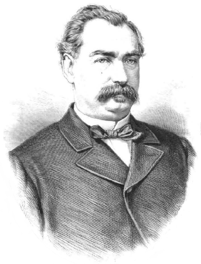 "Excmo. Sr. D. José de Elduayen, Marqués del Pazo de la Merced. Nuevo Ministro de Ultramar". 12x17 cm.